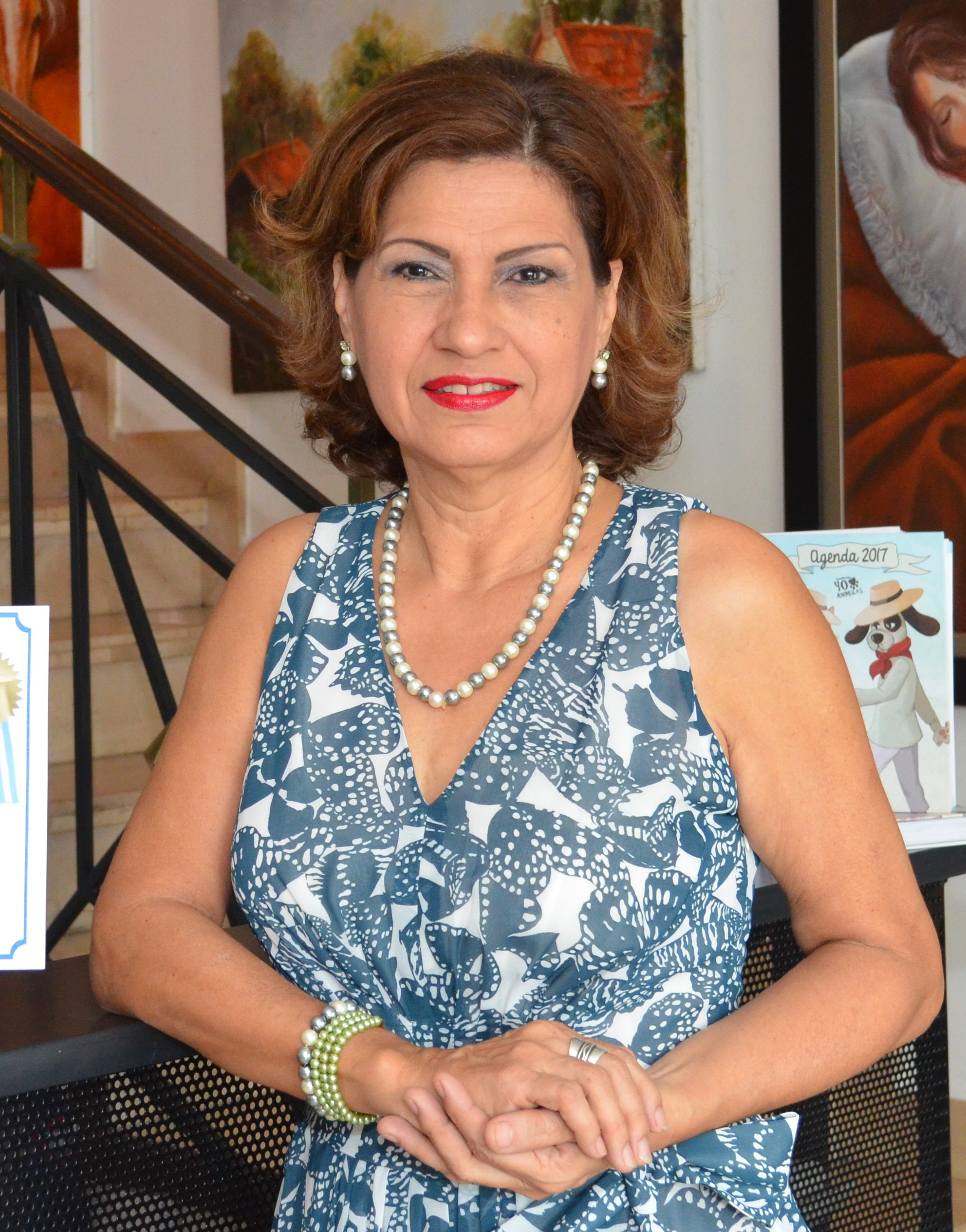 Sonnia de Marques, Pintora Ecuatoriana